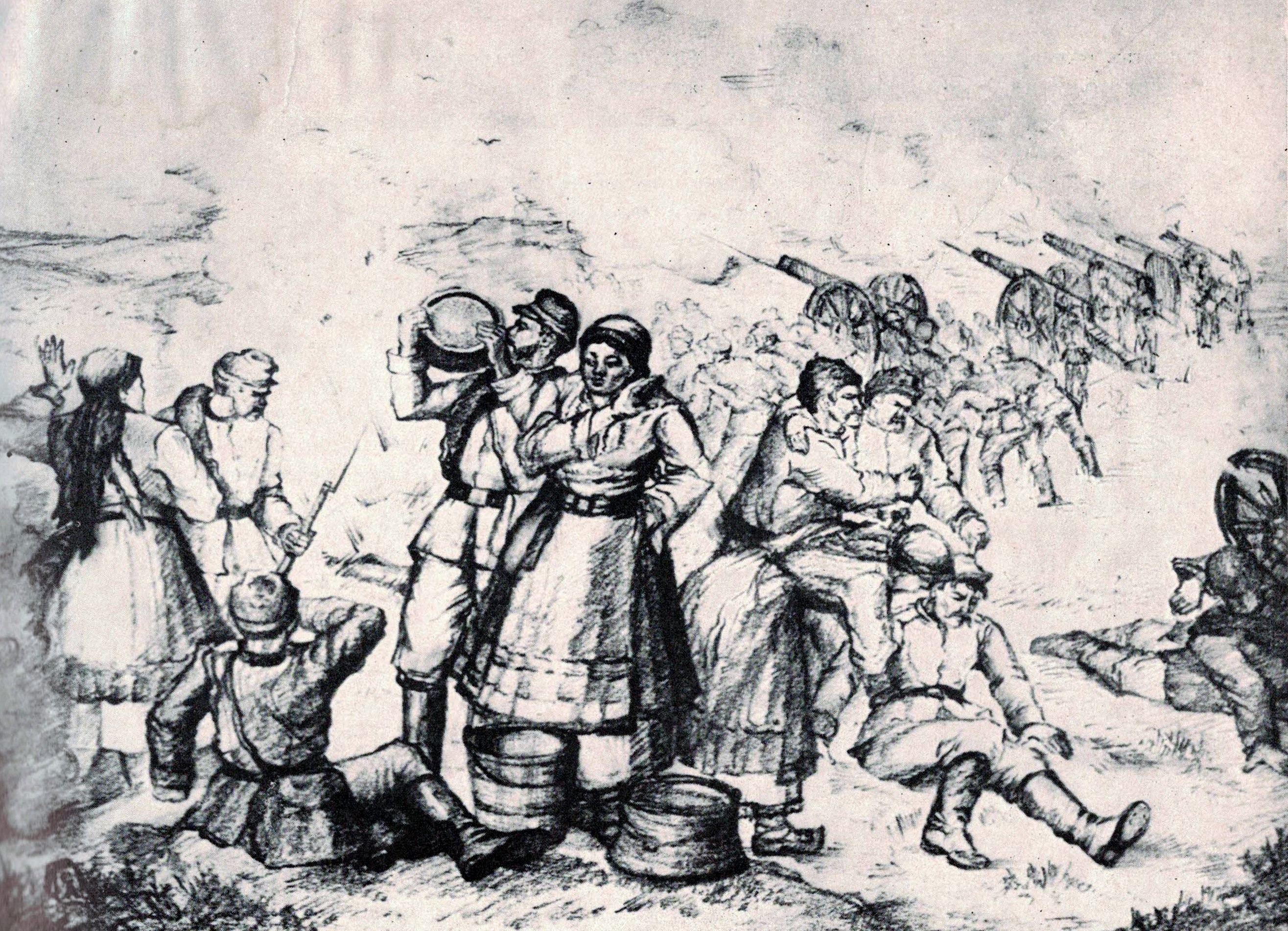 Българки от с. Въбел носят вода на руските воини от 20-ти Галицки пехотен полк по време на битката за Никопол на 3 юли 1877 г.